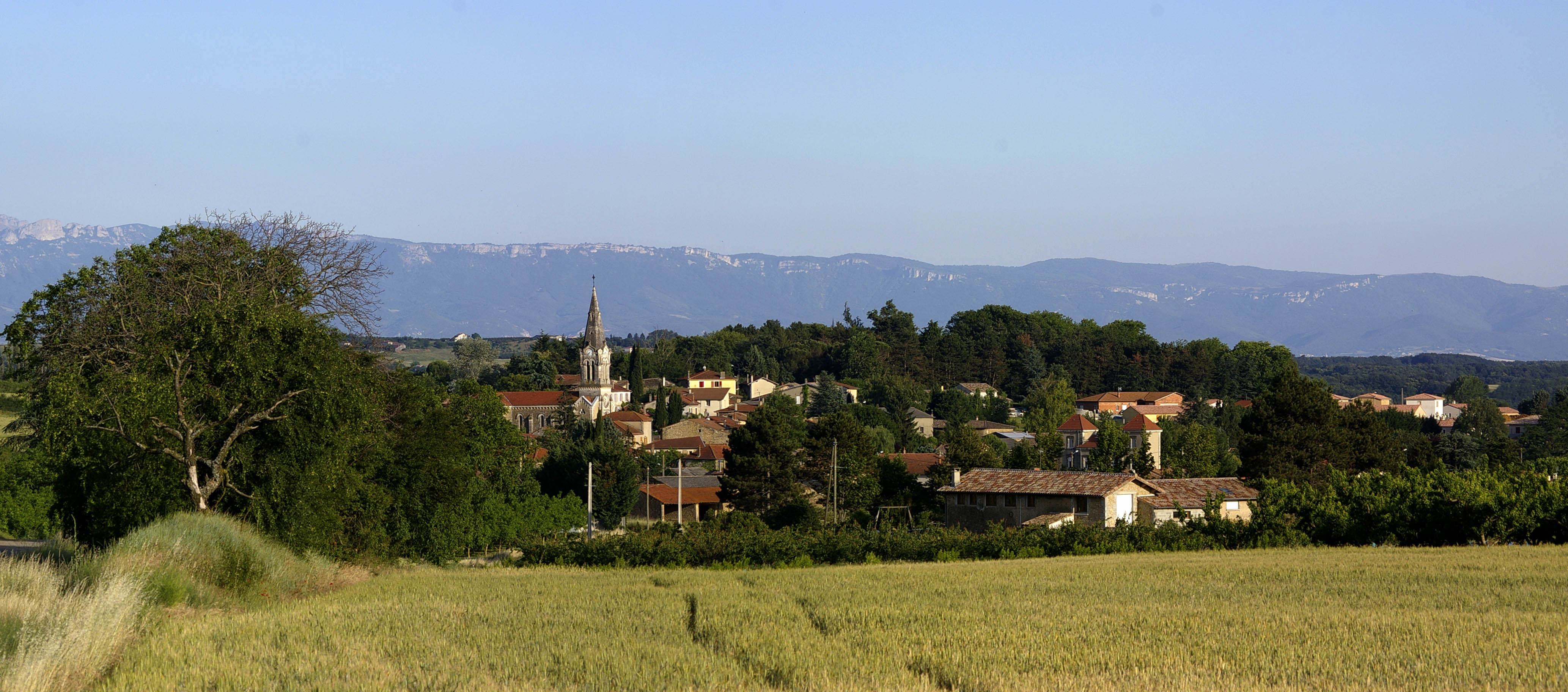 Village de Marsaz (Drôme)